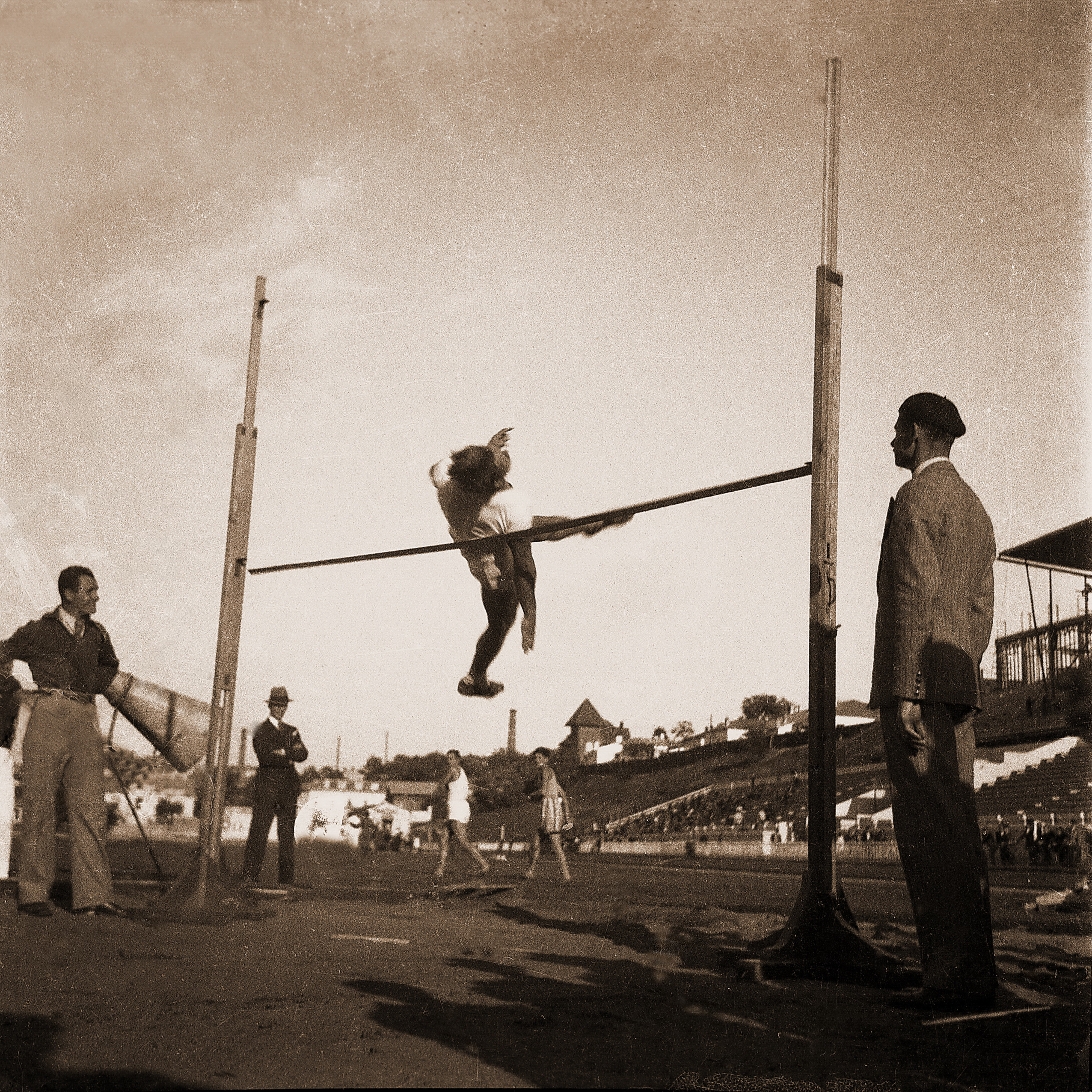 antrenament